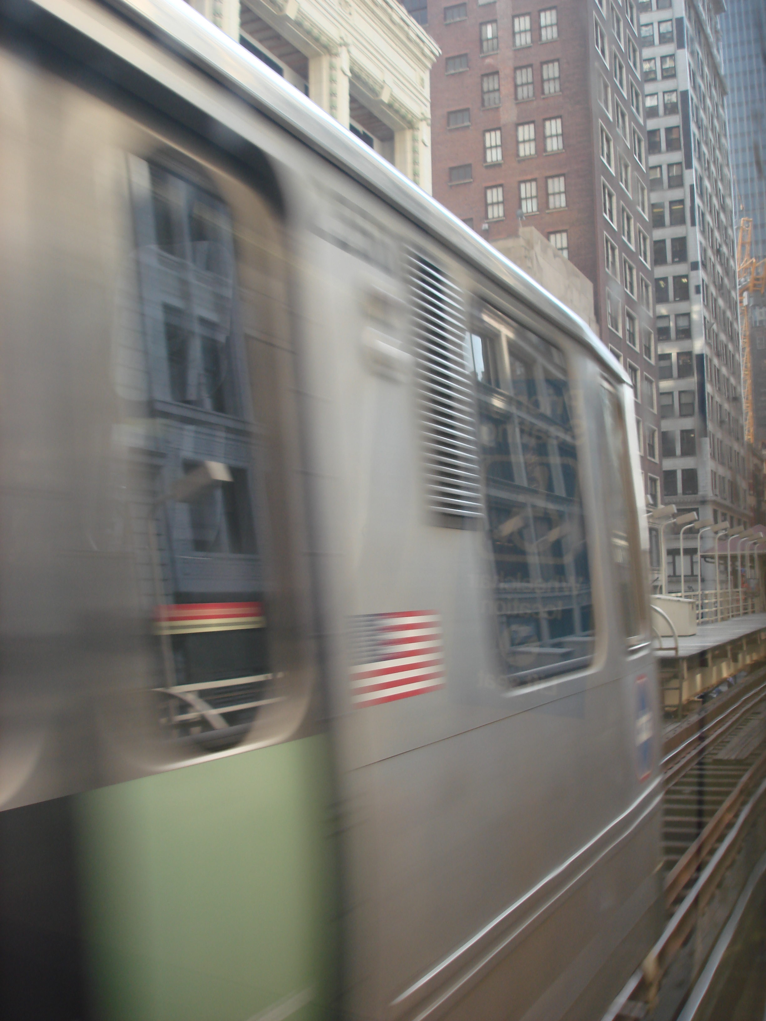 photo prise de 2 rames se croisant sur le loop. prise par moi même